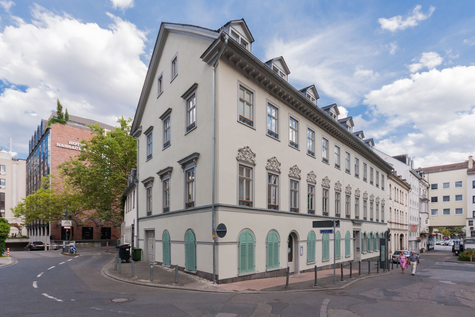 Spiegelgasse 9, Wiesbaden. Im diesem Gebäude ist das Aktives Museum Spiegelgasse und das Pariser Hoftheater untergebracht.